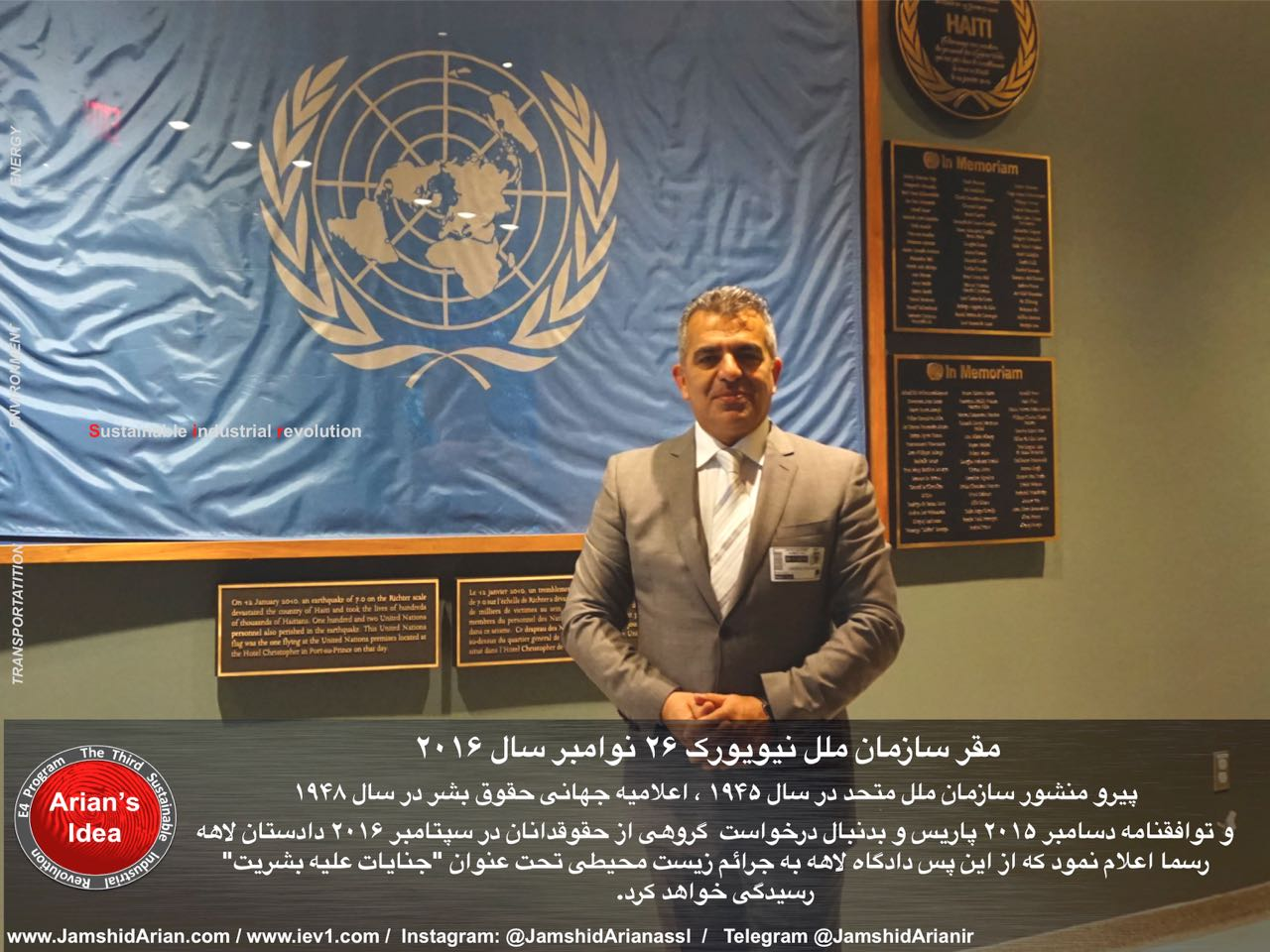 جمشید آرین در مقر سازمان ملل در نیویورک نوامبر سال ۲۰۱۶